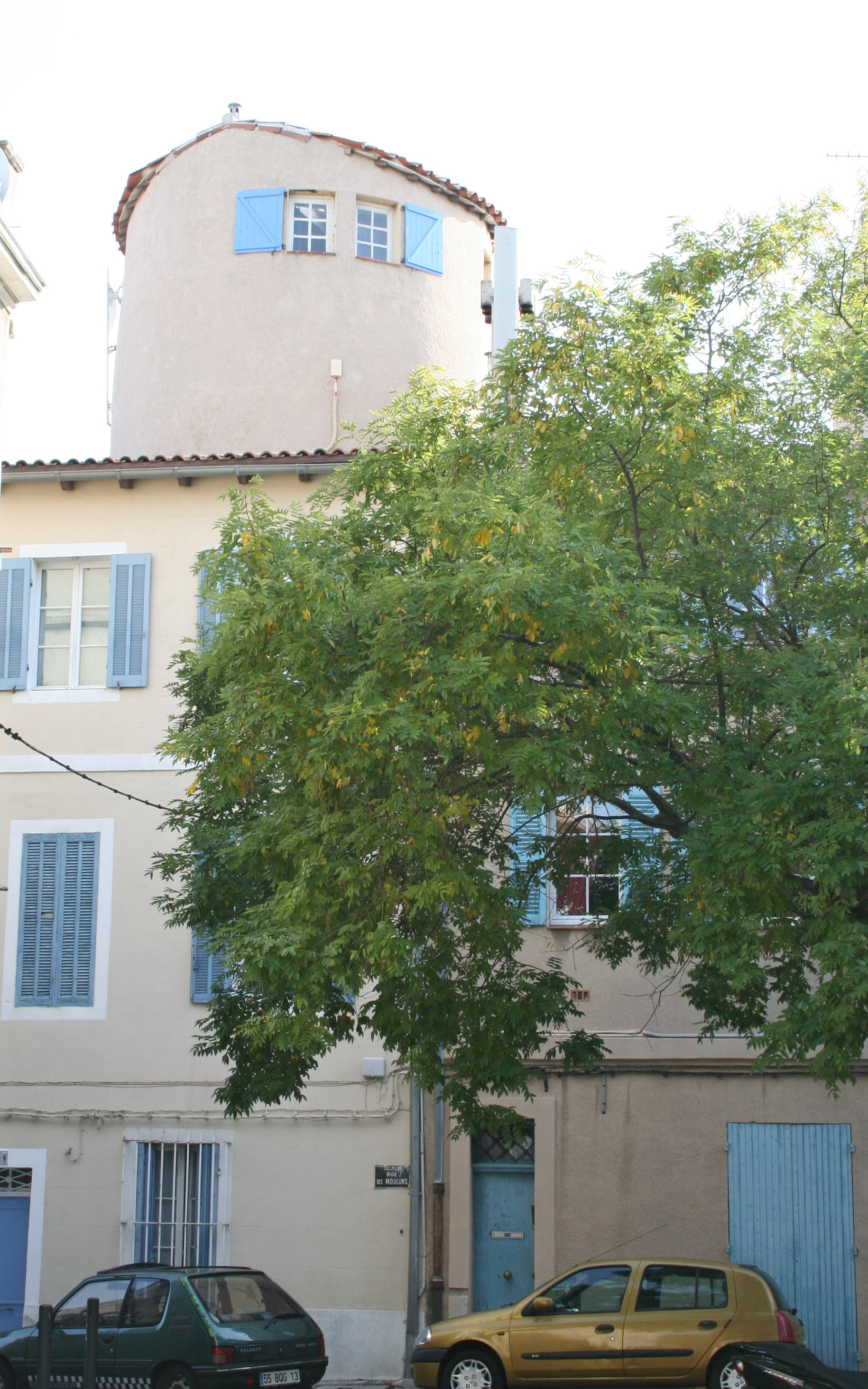 Place des moulins à Marseille, reste d'un ancien moulin amènagé en habitation.